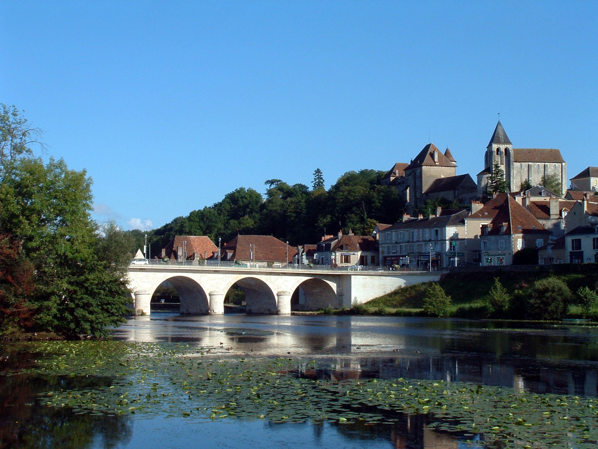 Le Blanc - Église Saint-Cyran depuis le pont sur la Creuse